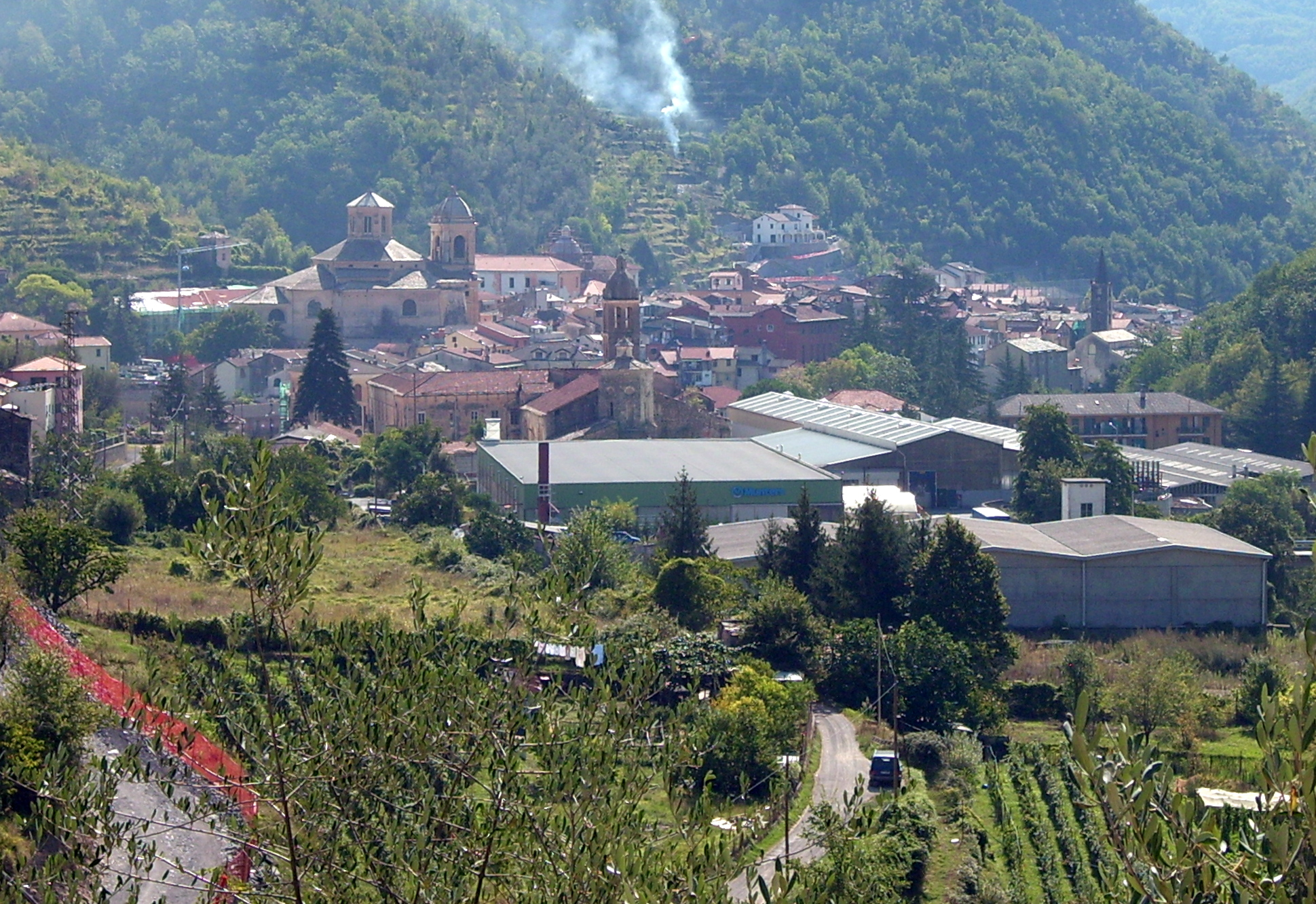 Pieve di Teco, Liguria, Italia